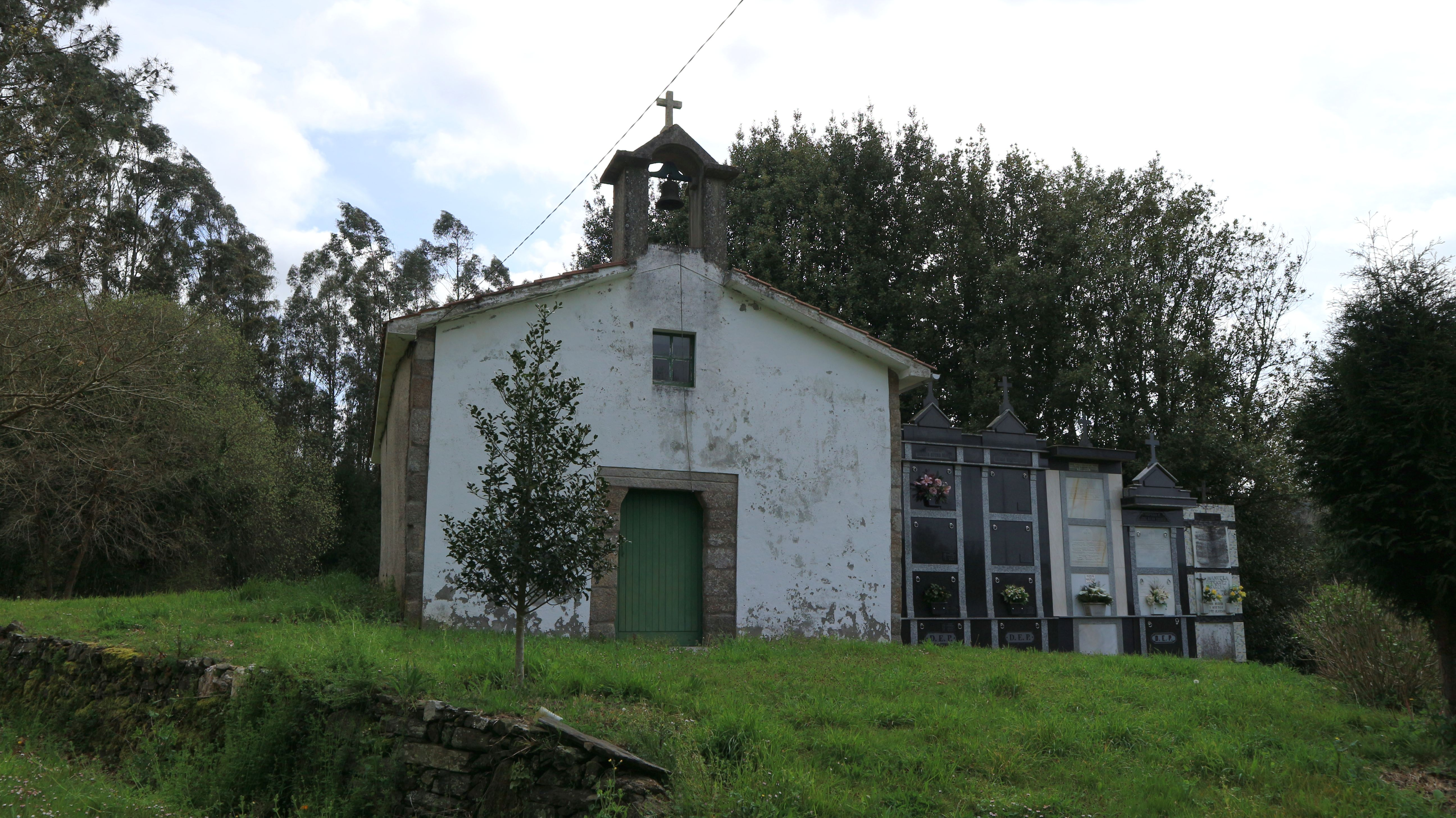 Igrexa de Santo Estevo de Vivente. Vivente, Oza-Cesuras.